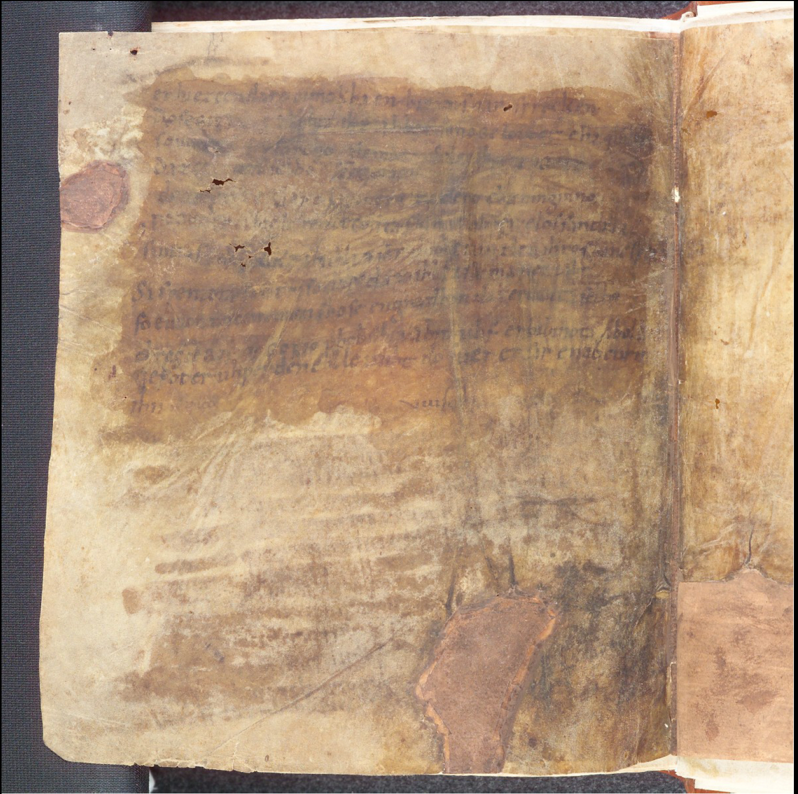 Fragmentarische Abschrift des Georgsliedes. Entstanden ist der Text Ende des 9. Jahrhunderts vermutlich im Kloster Prüm oder auf der Insel Reichenau (Bodensee).